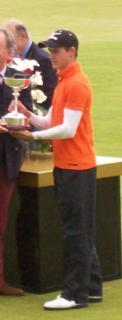 Daan Huizing (Niederlande) bei der Siegerehrung zur St Andrews Links Trophy 2012